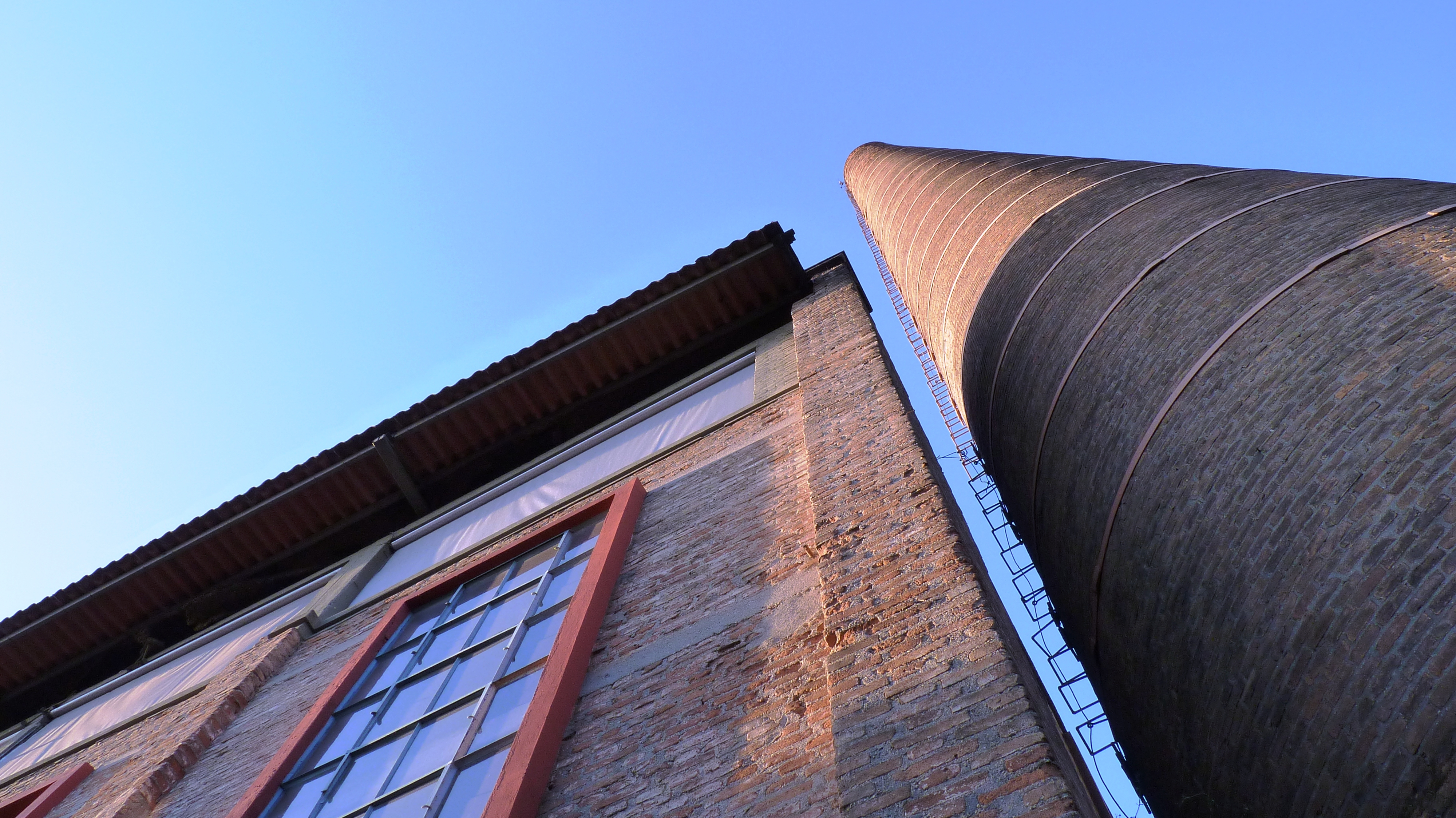 São Paulo